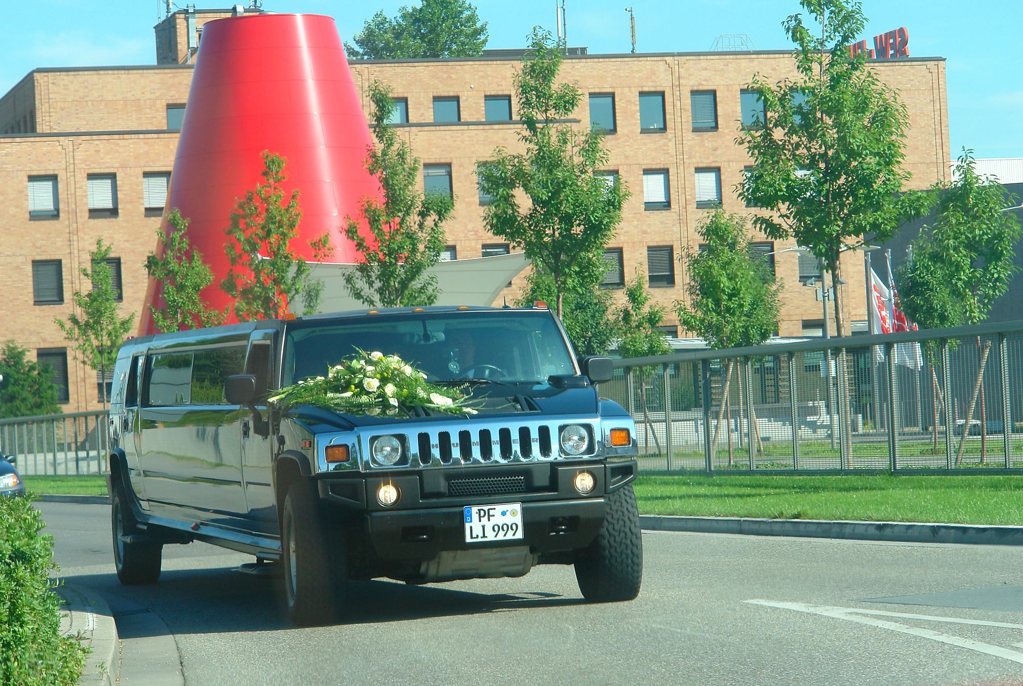 Stretch Hummer der Firma Dreamlimo GmbH im Einsatz bei einer Hochzeit